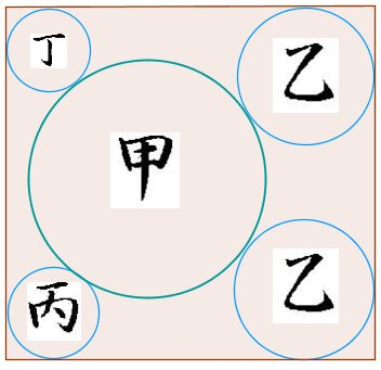 Problem of Sangaku